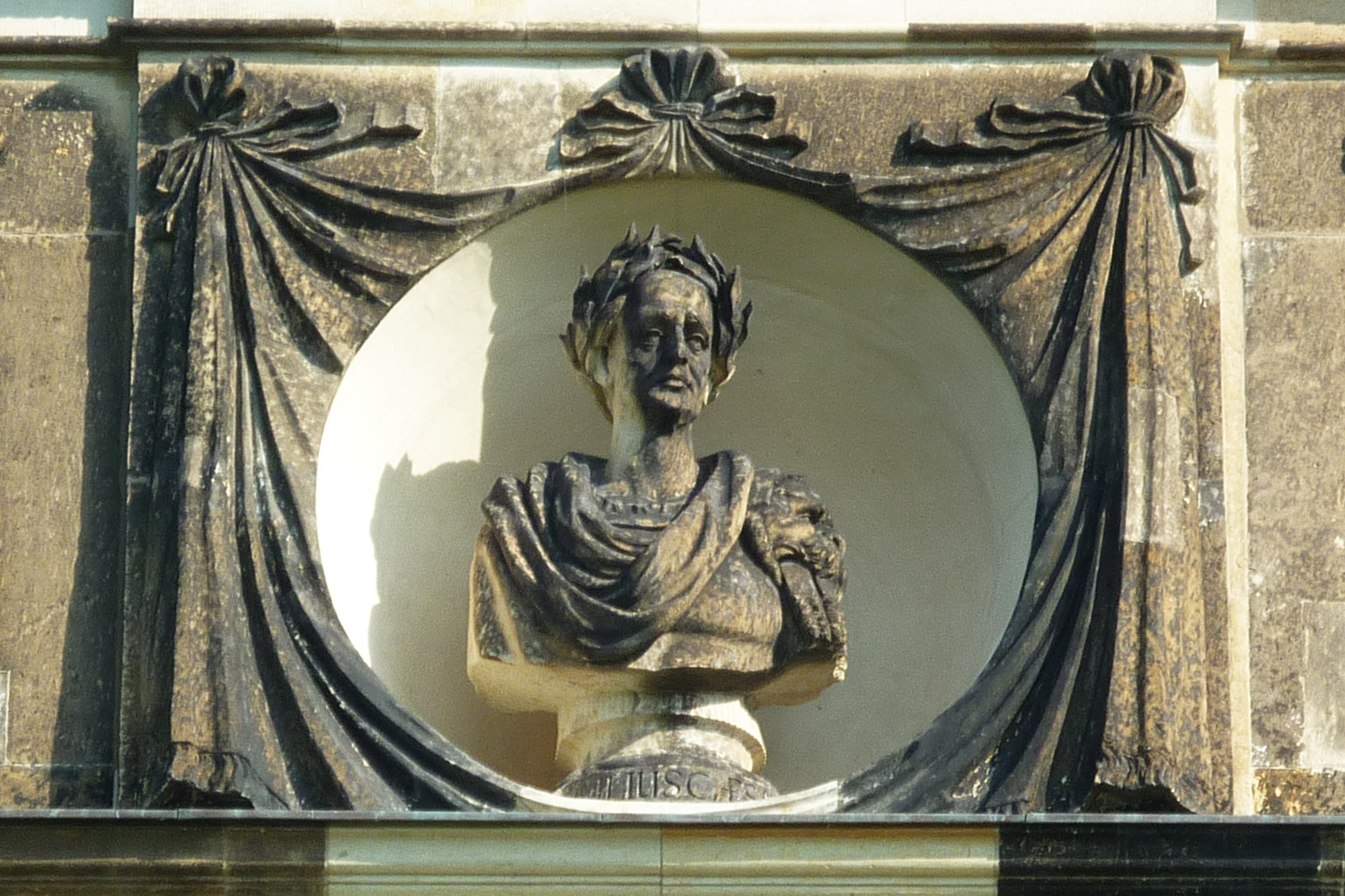 Büste von Julius Cäsar am Palais im Großen Garten in Dresden